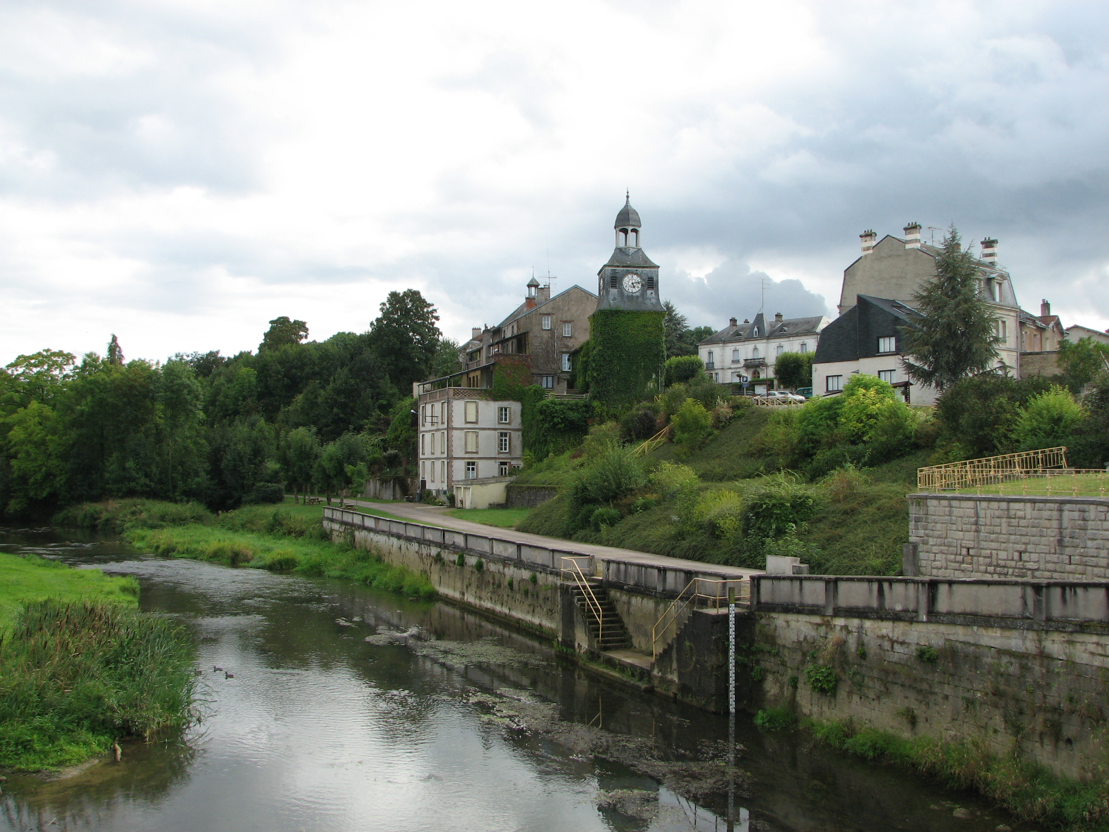 Varennes en Argonne vue de la ville haute depuis le pont sur l'Aire avec la tour Louis XVI.